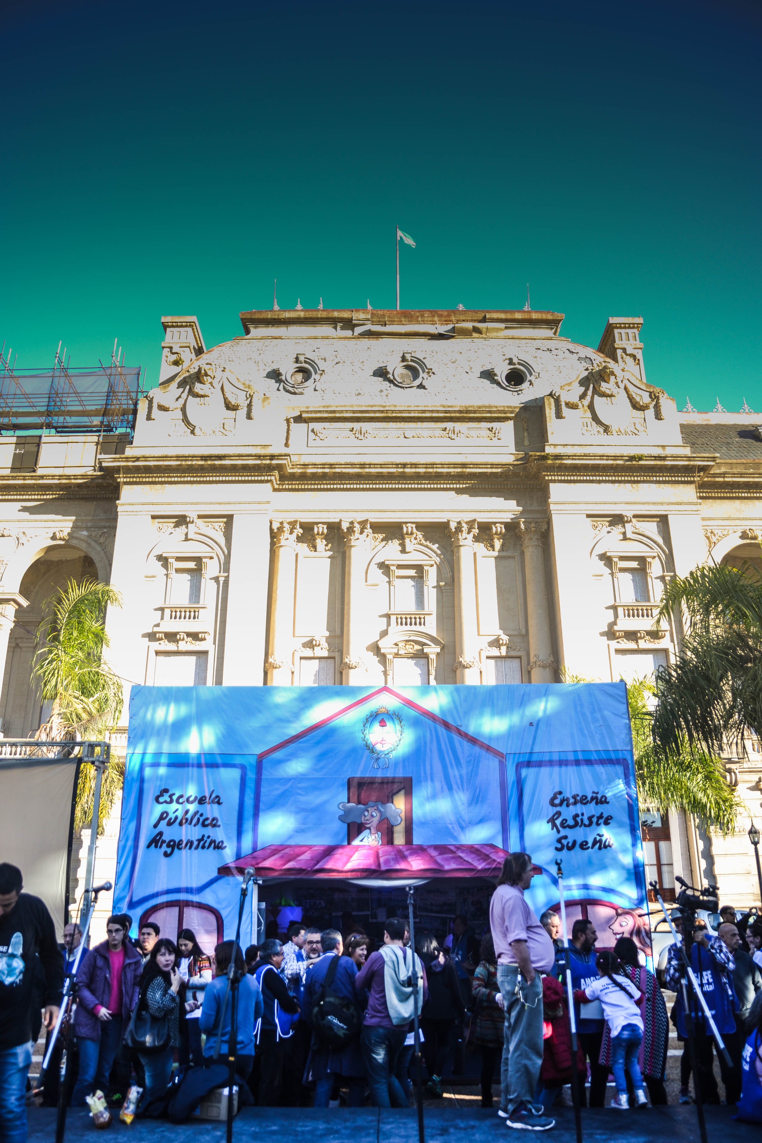 Escuela pública itinerante en la ciudad de Santa Fe